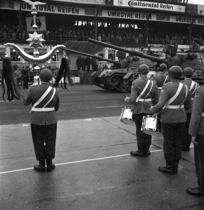 20 Jahre NATO. Bundeswehrparade auf dem Nürburgring